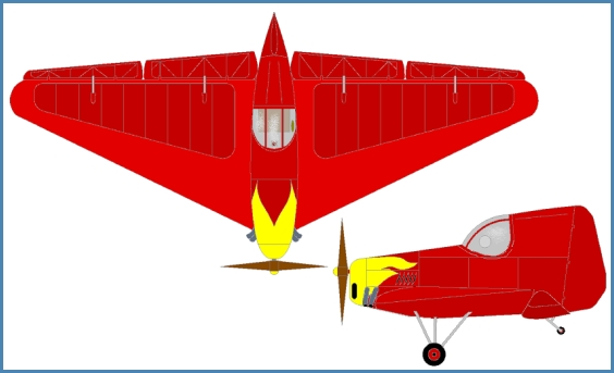 Tscheranovsky_BiTsch20